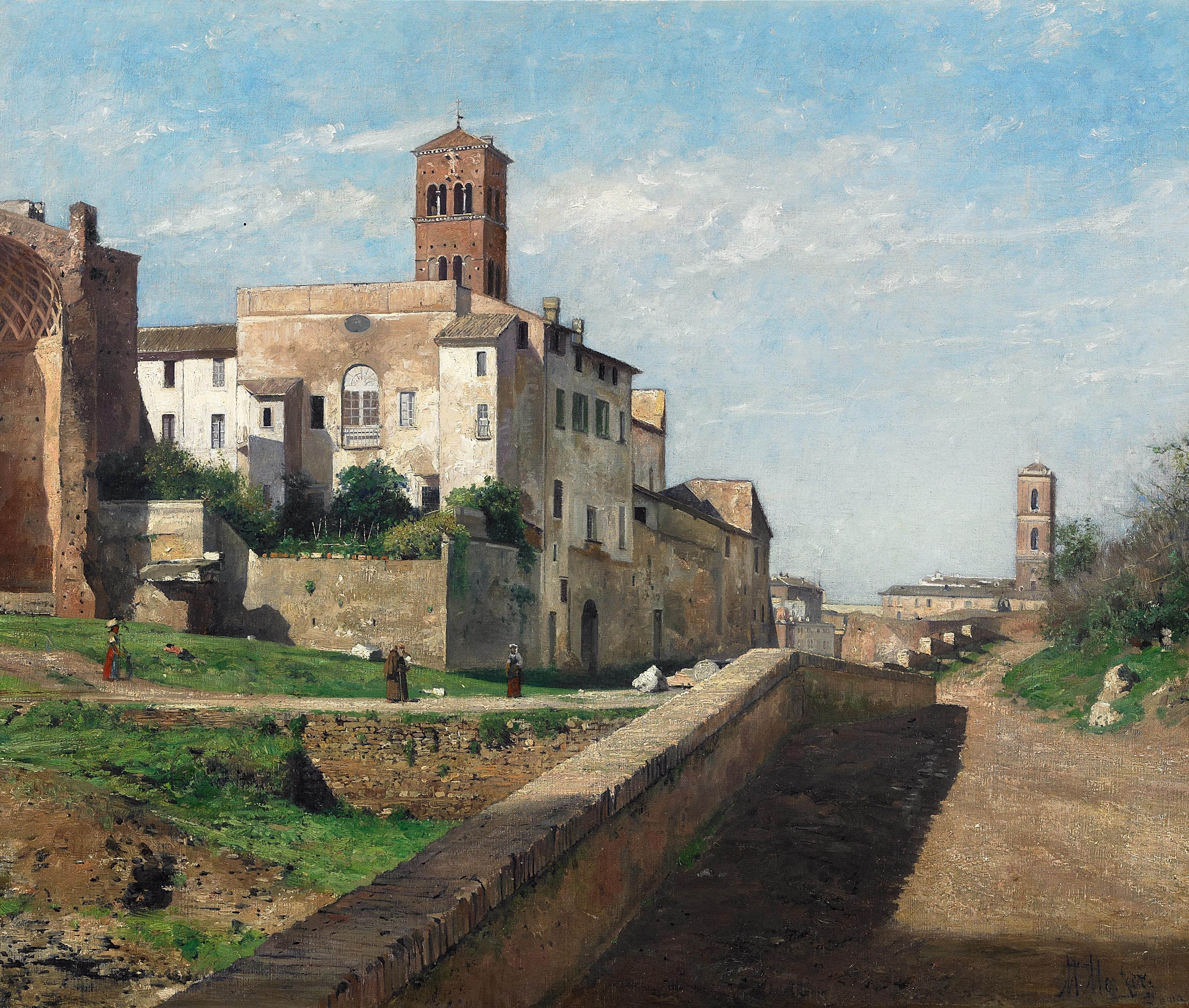 Am Palatin in Rom. Blick auf die Klosterkirche Santa Francesca Romana, dahinter das Tabularium mit Turm. Signiert unten rechts: M Merker Roma. Öl auf Leinwand. 61 x 74 cm.